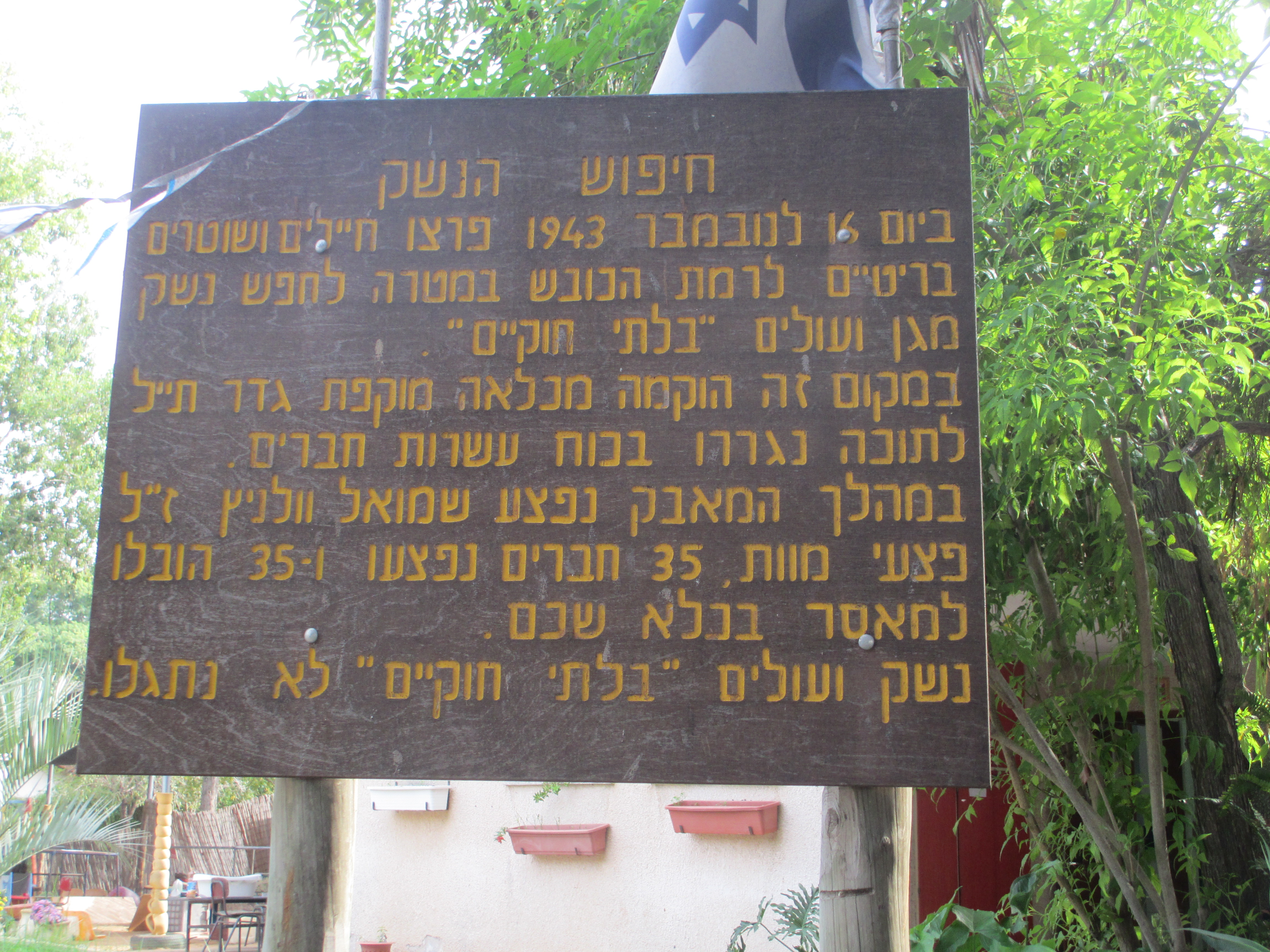 שלט הסבר על חיפוש הנשק ברמת הכובש